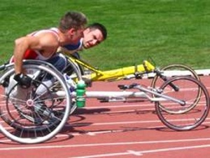 club esportiu guttmann